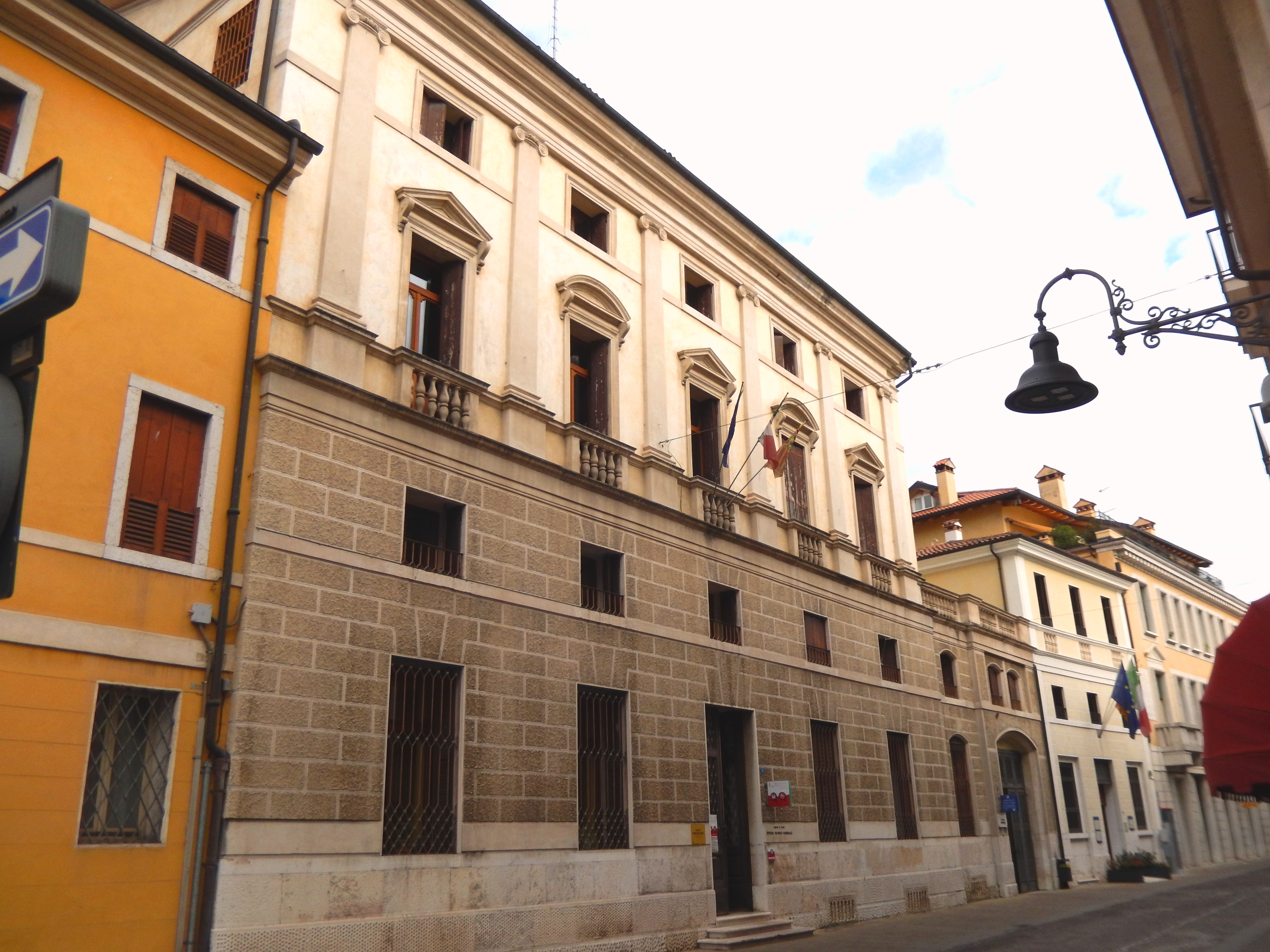 Palazzo Rossi Maraschin This is a photo of a monument which is part of cultural heritage of Italy.